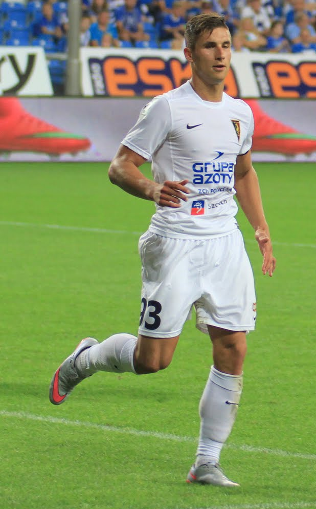 Łukasz Zwoliński playing for Pogoń Szczecin in 2015